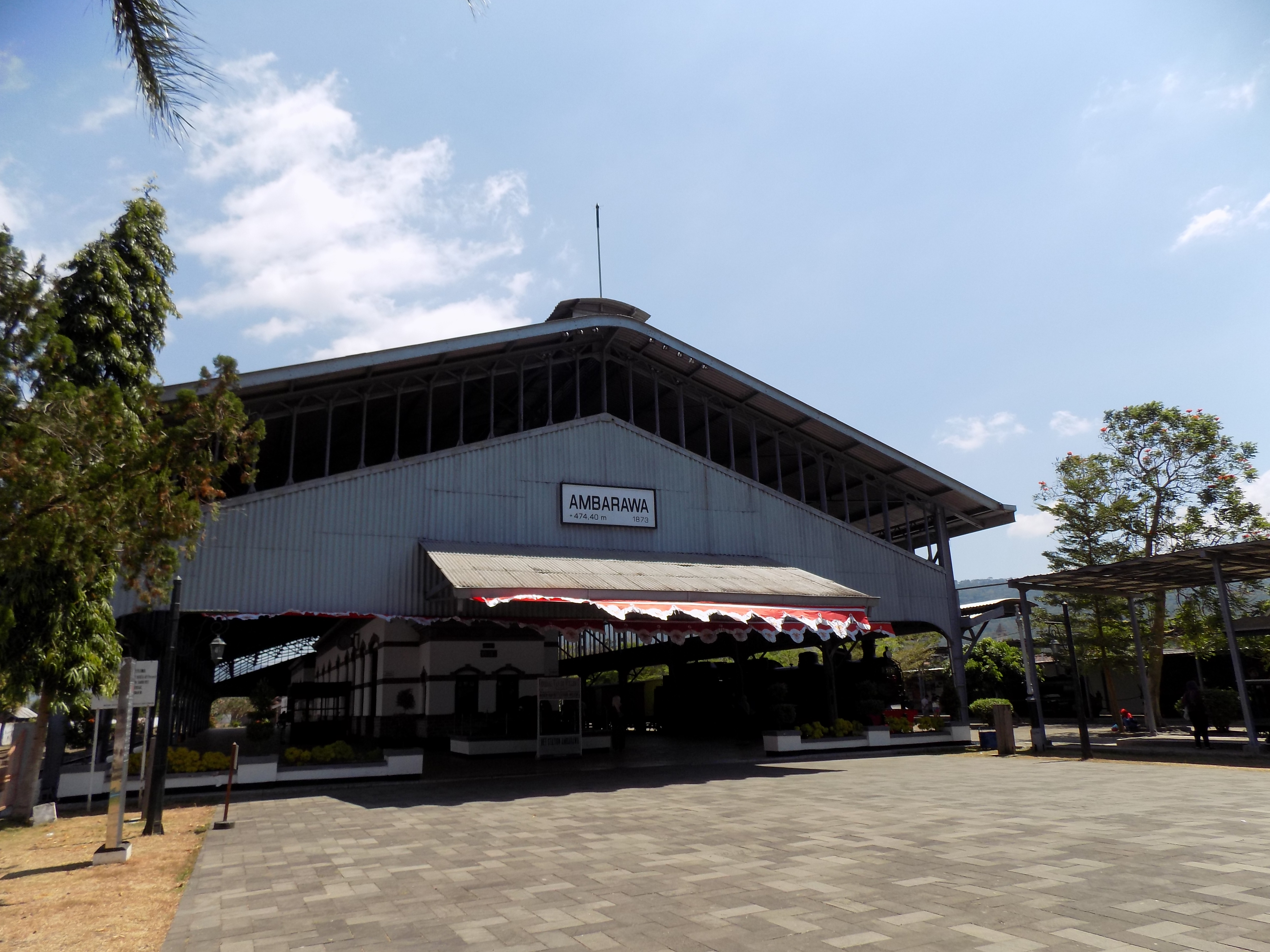 Stasiun Ambarawa yang menjadi Museum KA Ambarawa